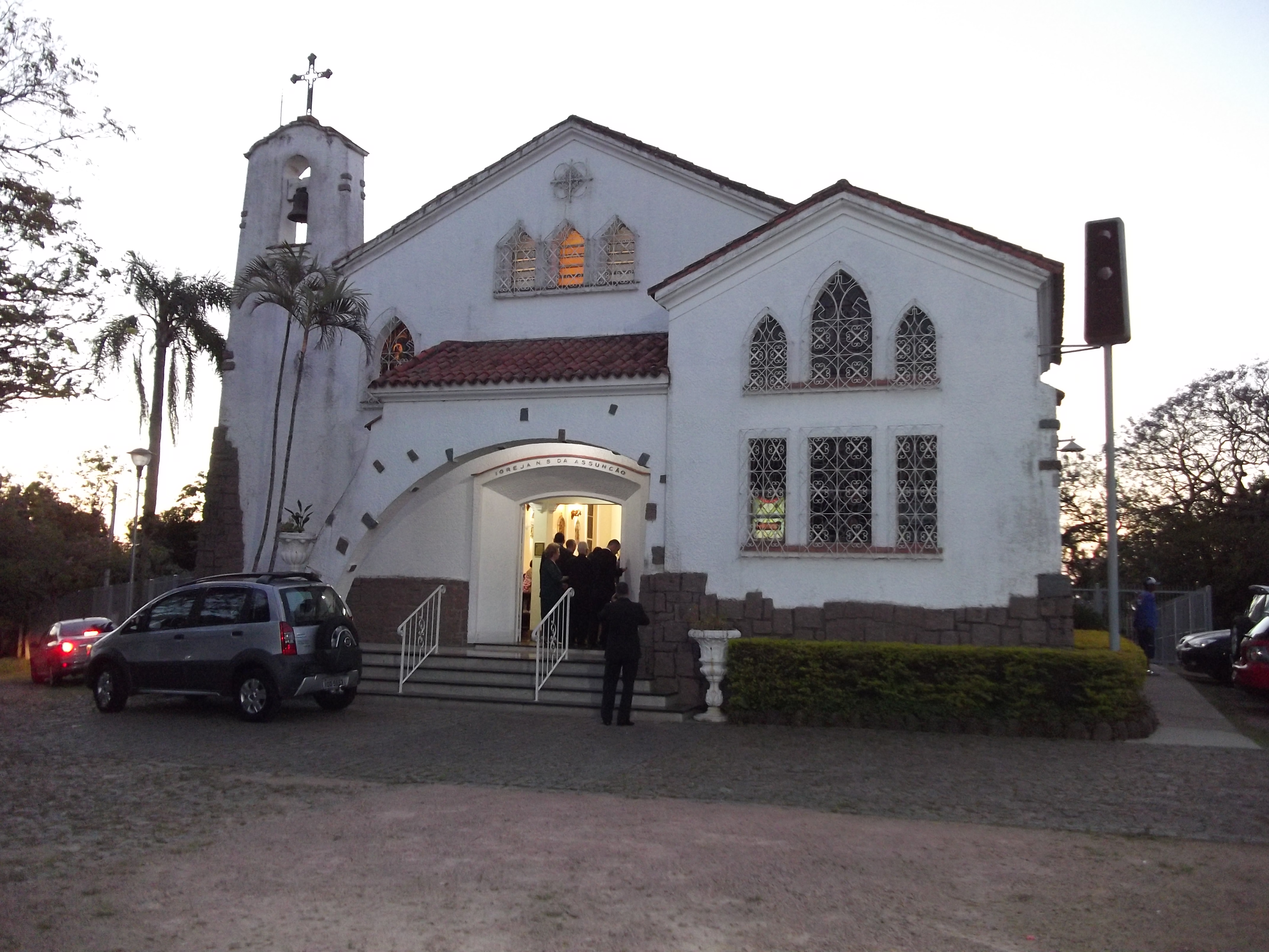 Igreja de Nossa Senhora da Assunção em Porto Alegre, Brasil